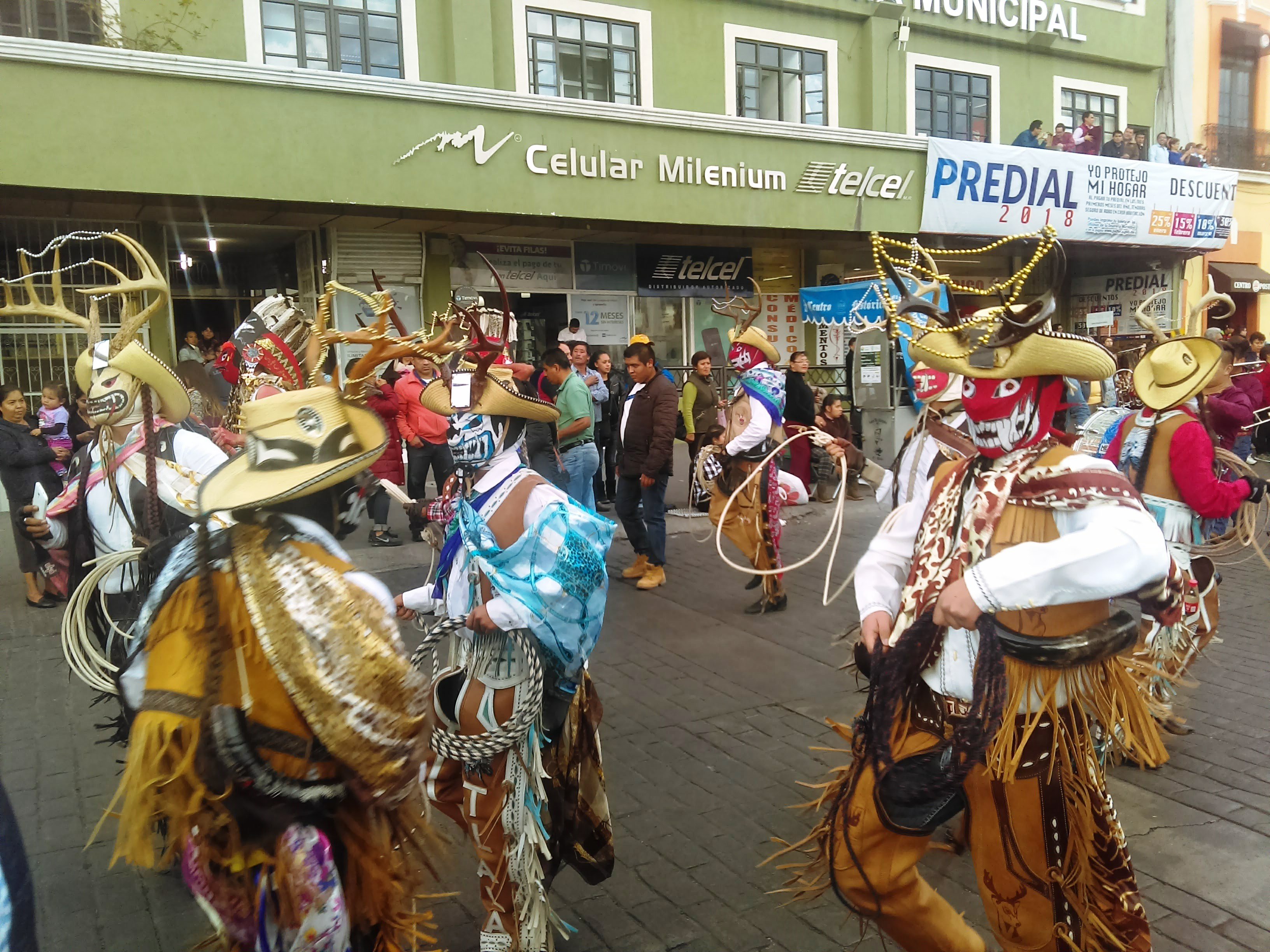 Desfile "Magia de los Carnavales de Hidalgo" en Pachuca de Soto, México (2017). Representación del Municipio de Calnali.